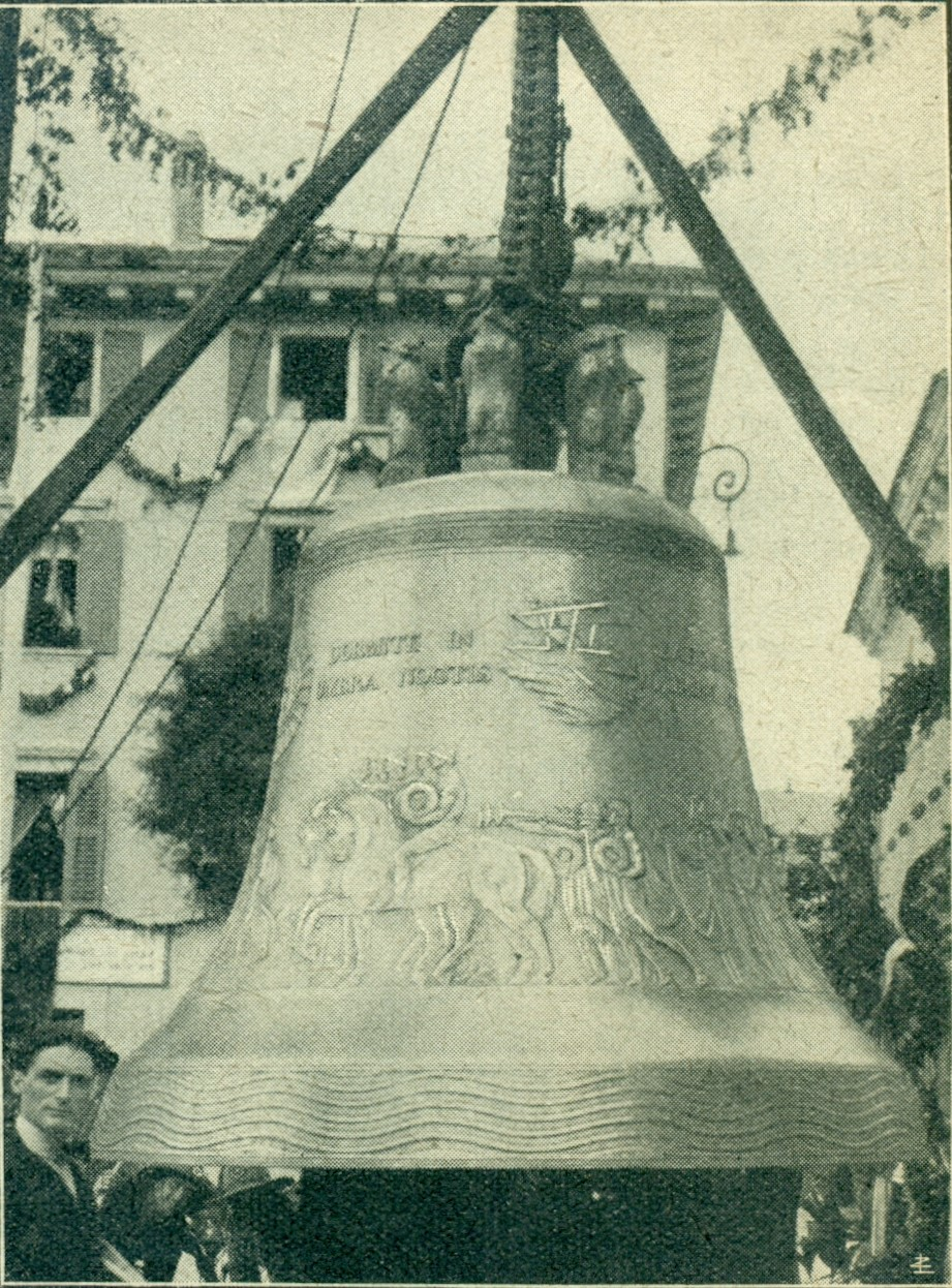 Campana dei caduti negli anni 20 - Arrivo a Rovereto Foto originale anni 20 - biblioteca personale